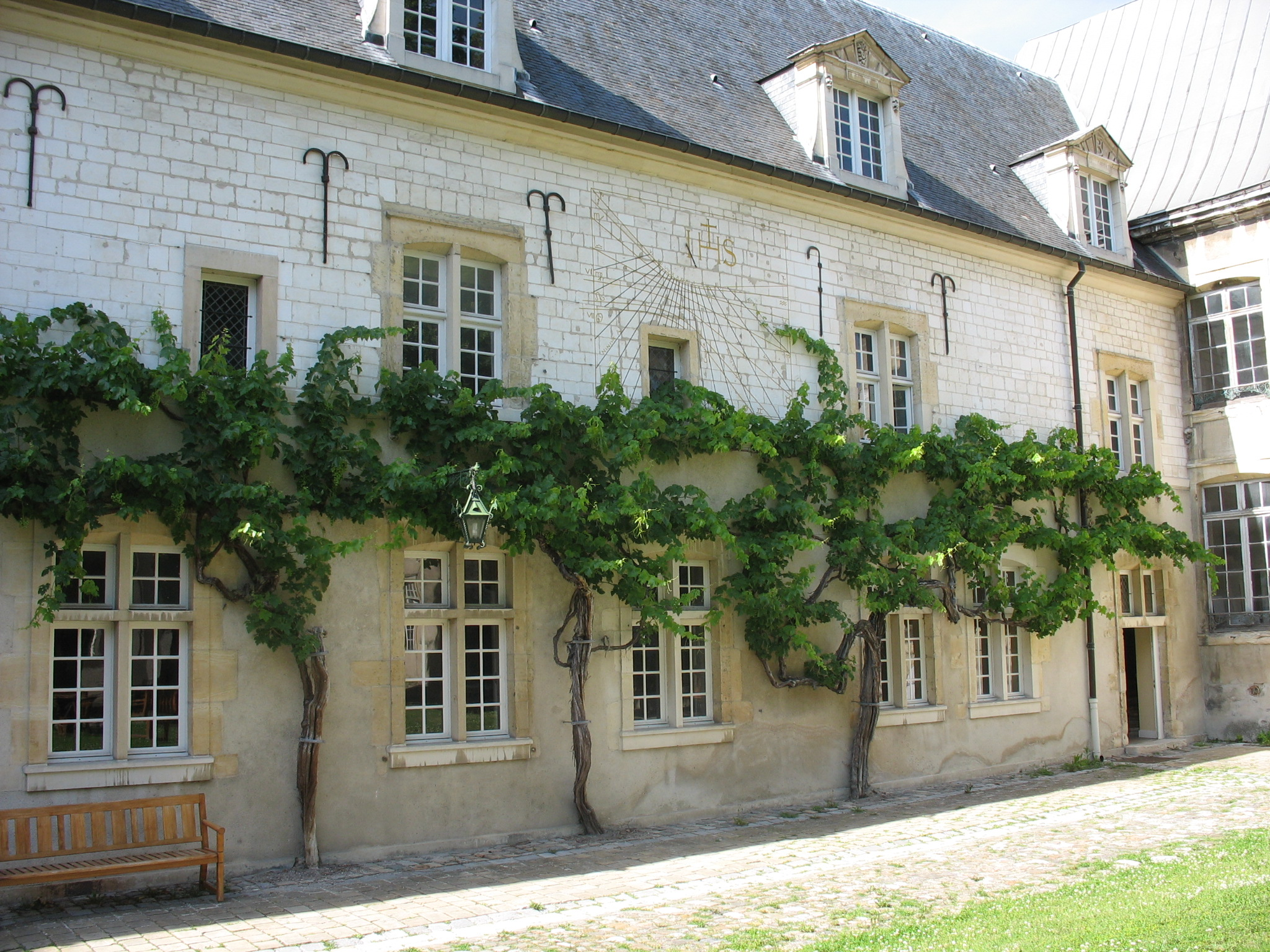 L'une des cours de l'Ancien Collège des Jésuites — Reims, Champagne-Ardenne, France. Elle a un cadran solaire et des pieds de vigne pluri-centenaires qui ont résister au phyloxera.